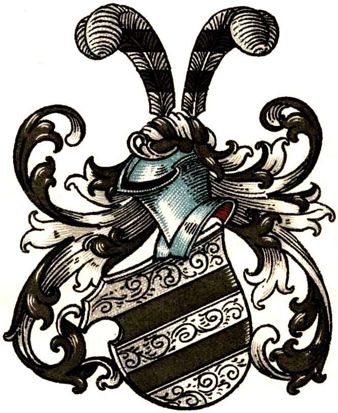 Stammwappen der von Mengden